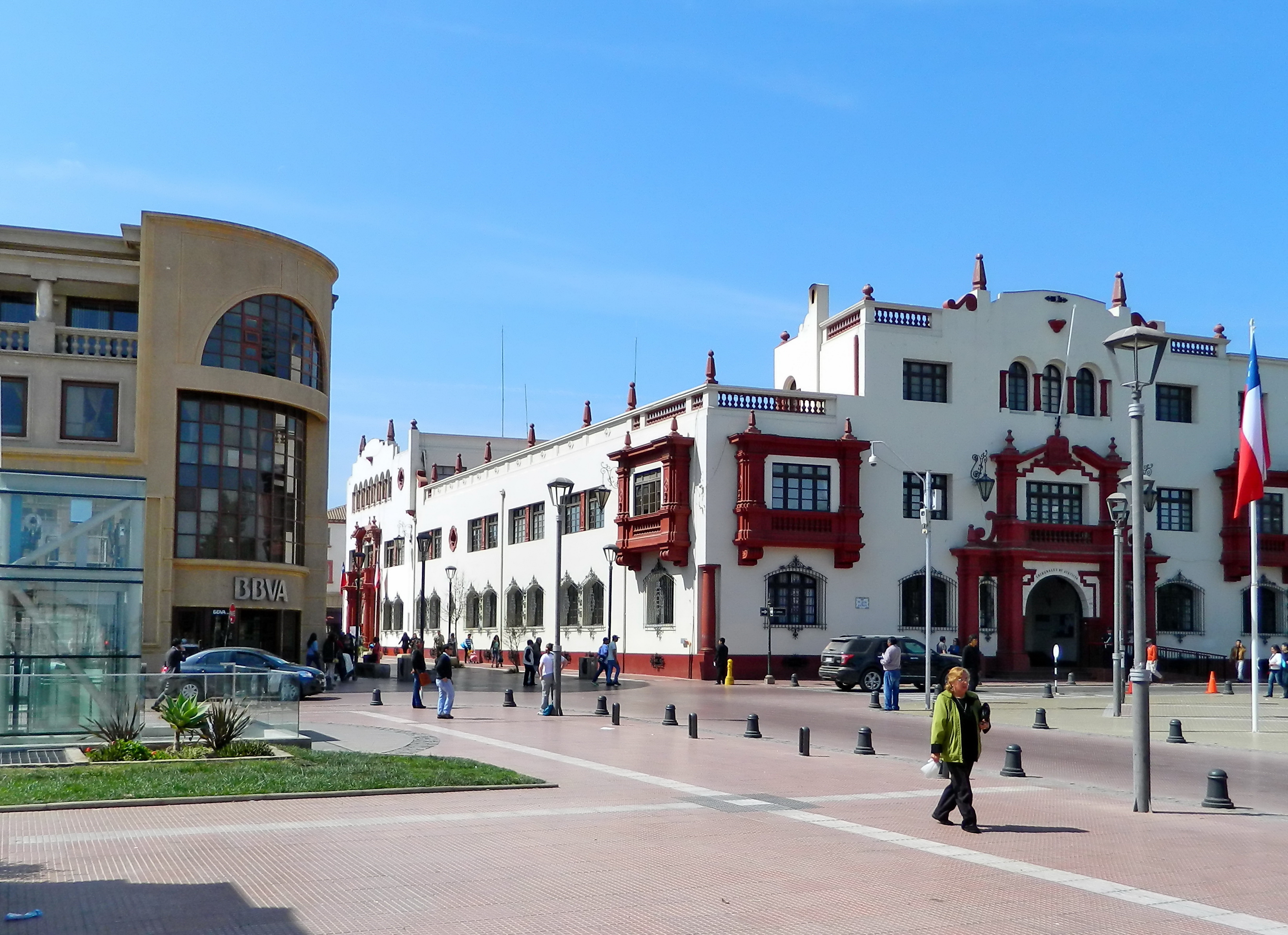 Centro histórico de La Serena This is a photo of a national monument in Chile: 602